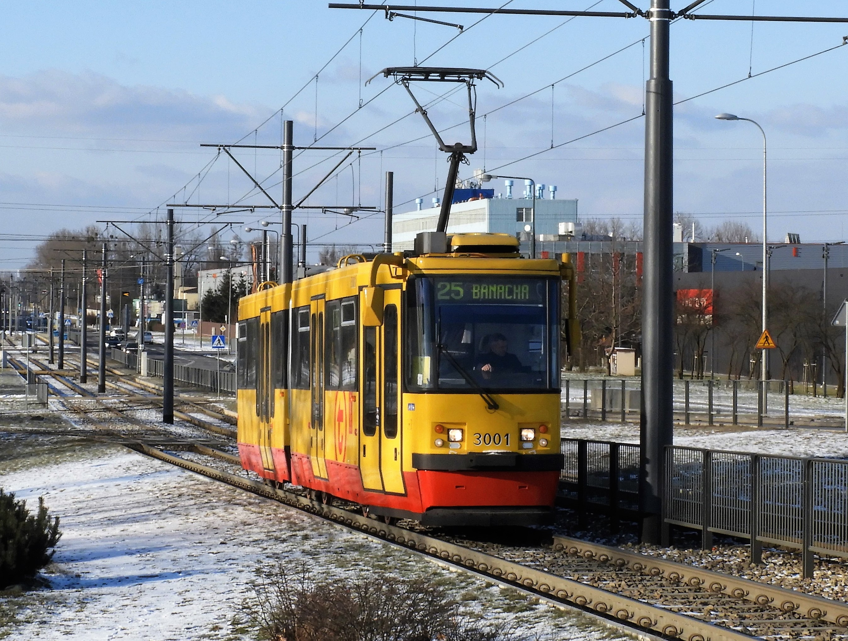 Tramwaj typu Konstal 112N w Warszawie